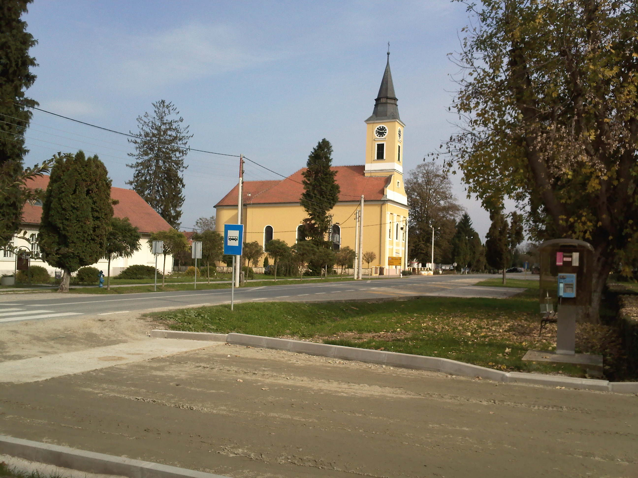 Gola crkva